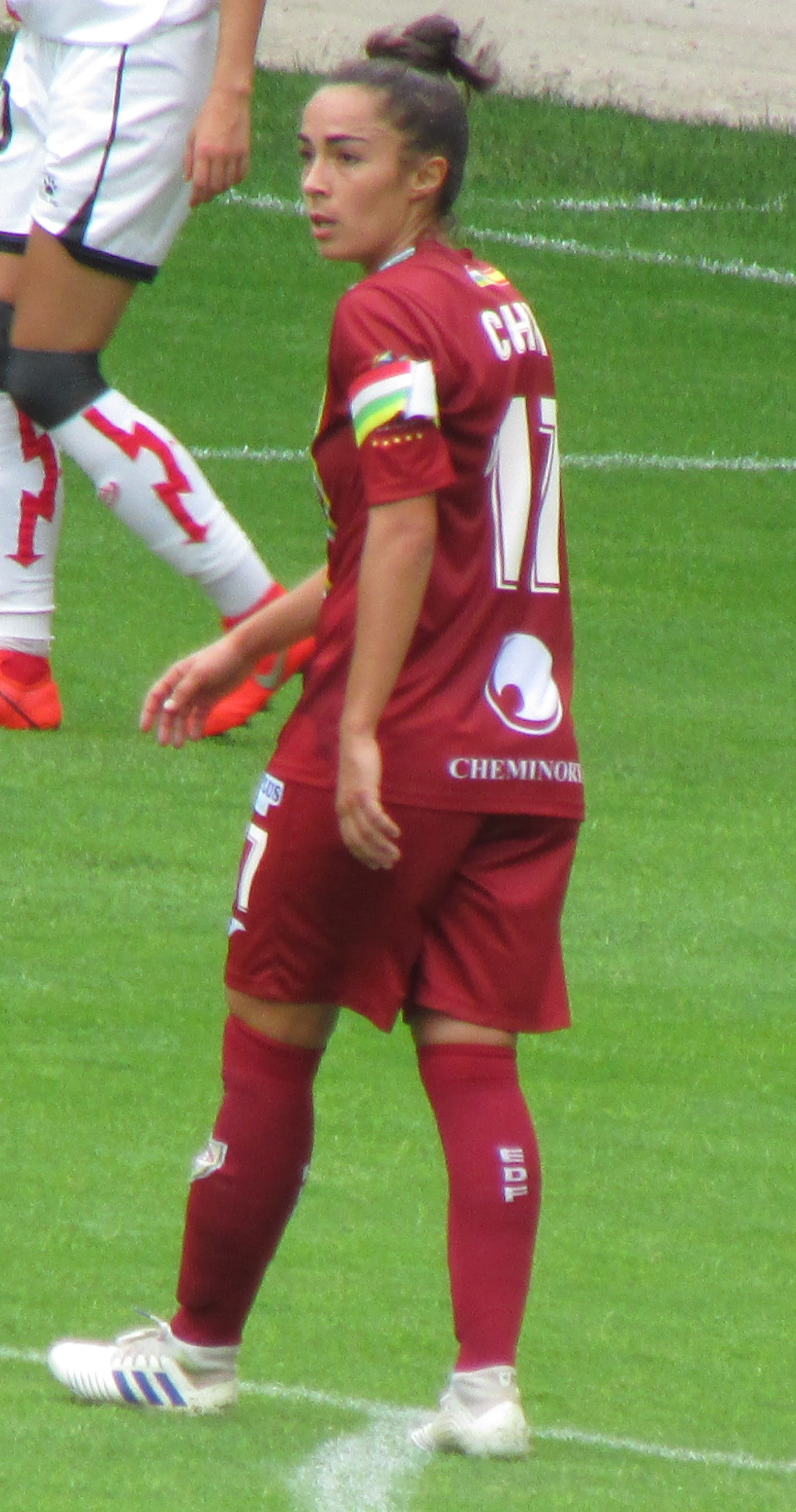 Chini Pizarro durante su etapa en el EDF Logroño. Partido de liga iberdrola contra el Rayo Vallecano. 08-09-2019